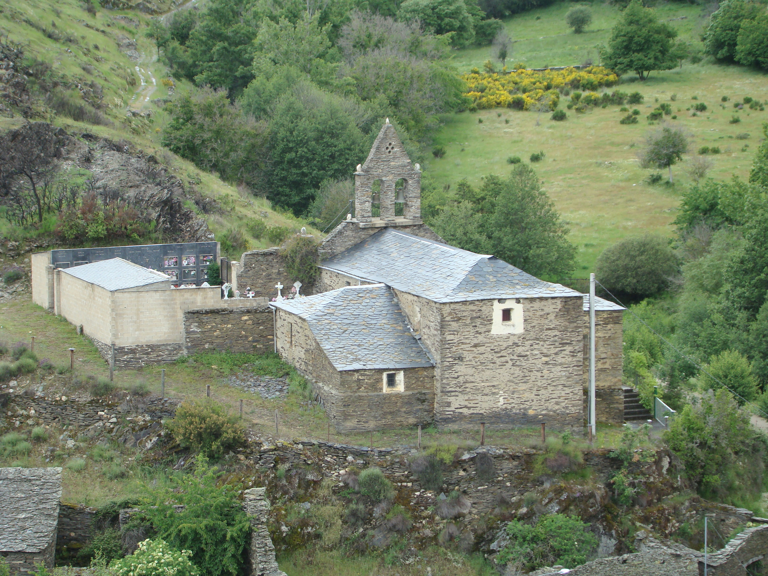 Vista de la iglesia de Santa Eulalia, en Santa Eulalia de Cabrera, municipio de Encinedo (León, España).